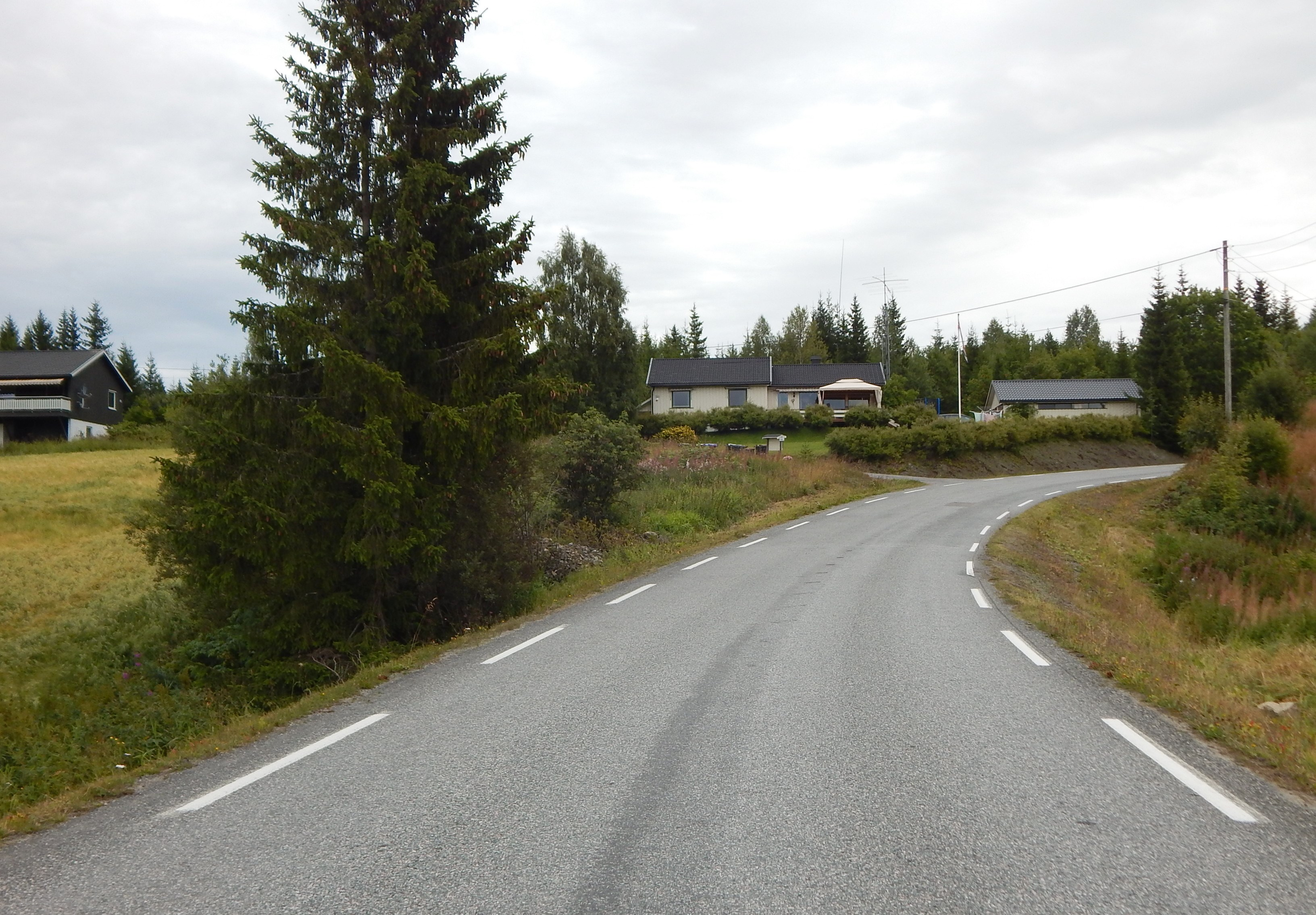 Sivesindhøgda (fylkesvei 2372, tidl. 112)